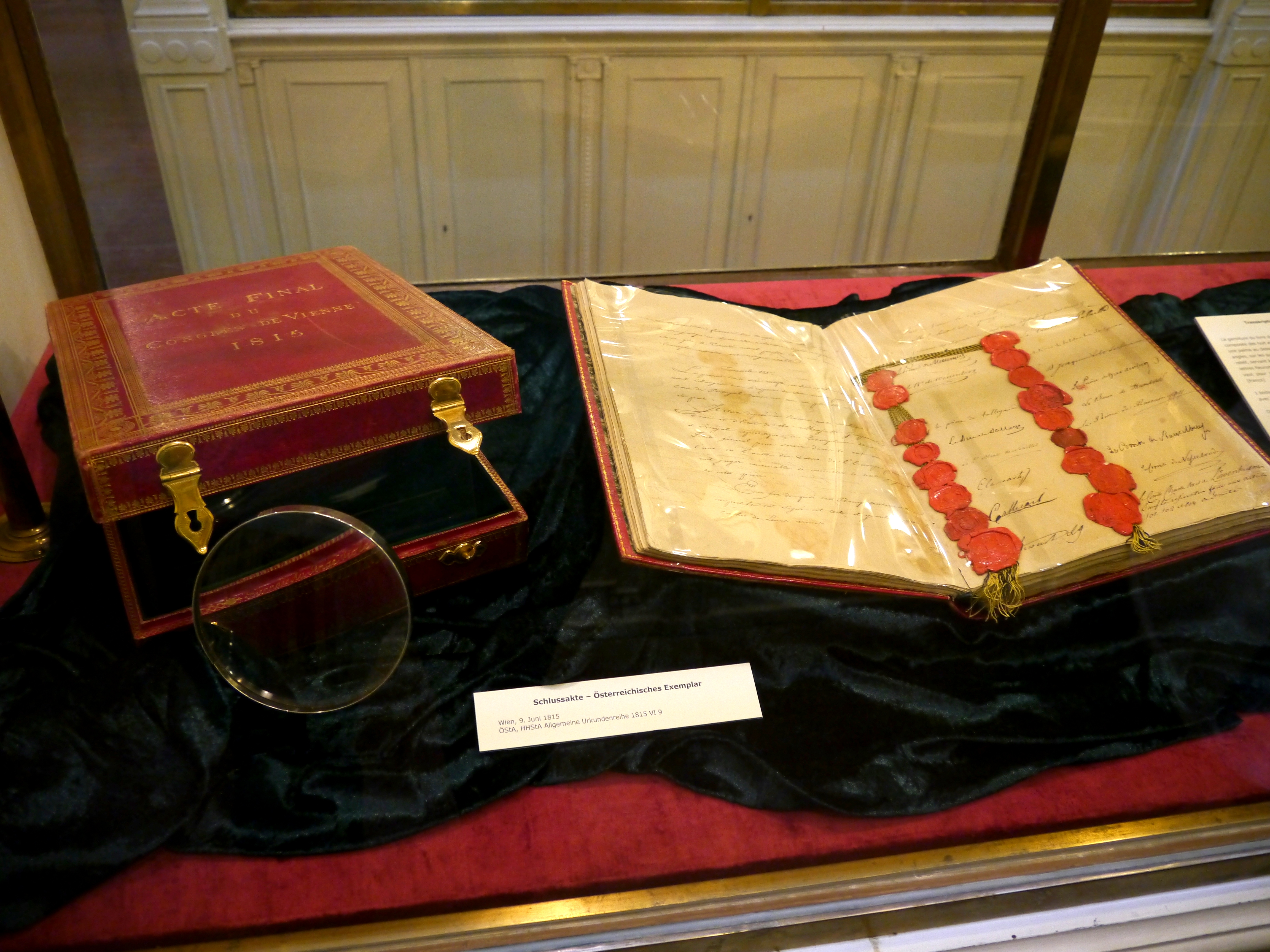 Wiener Kongress Abschlussdokument im Staatsarchiv am Minoritenplatz